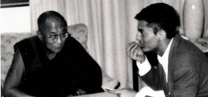 Stéphane-Xavier Trano avec le Dalai-Lama, en 1994, conversation sur le Processus de Paix Israélo-Palestinien.